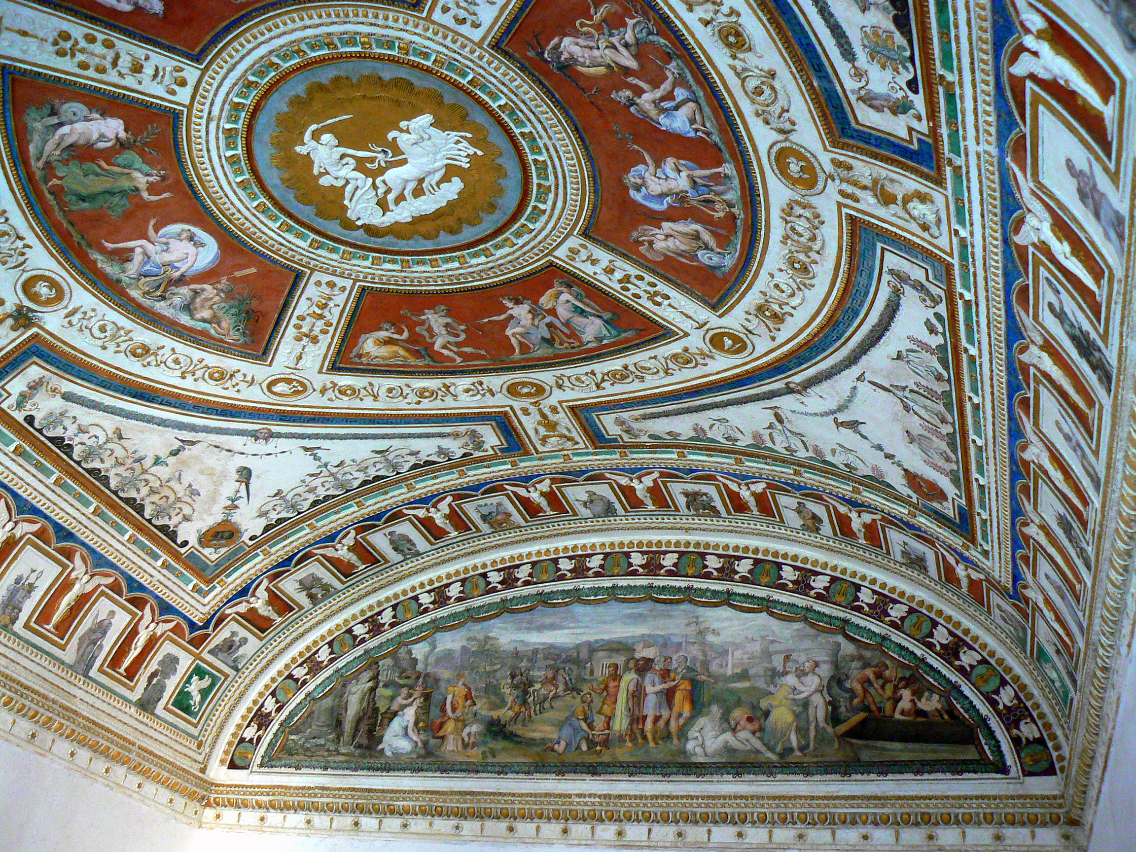 Museo di Palazzo Grimani (Castello) - MIBAC This is a photo of a monument which is part of cultural heritage of Italy.